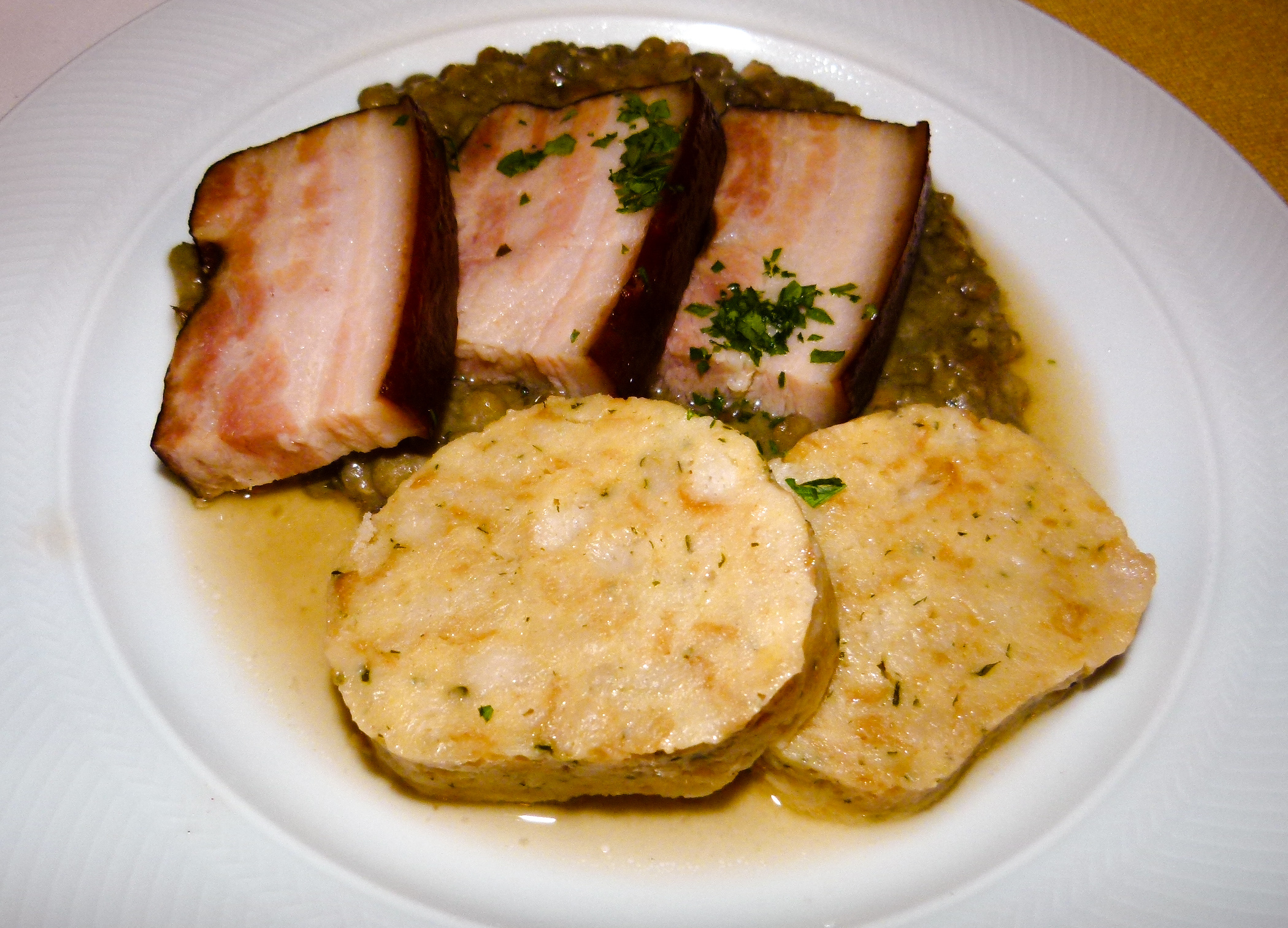 Kaiserfleisch mit Specklinsen und Serviettenknödel, Restaurant Jägerwirt, Wien